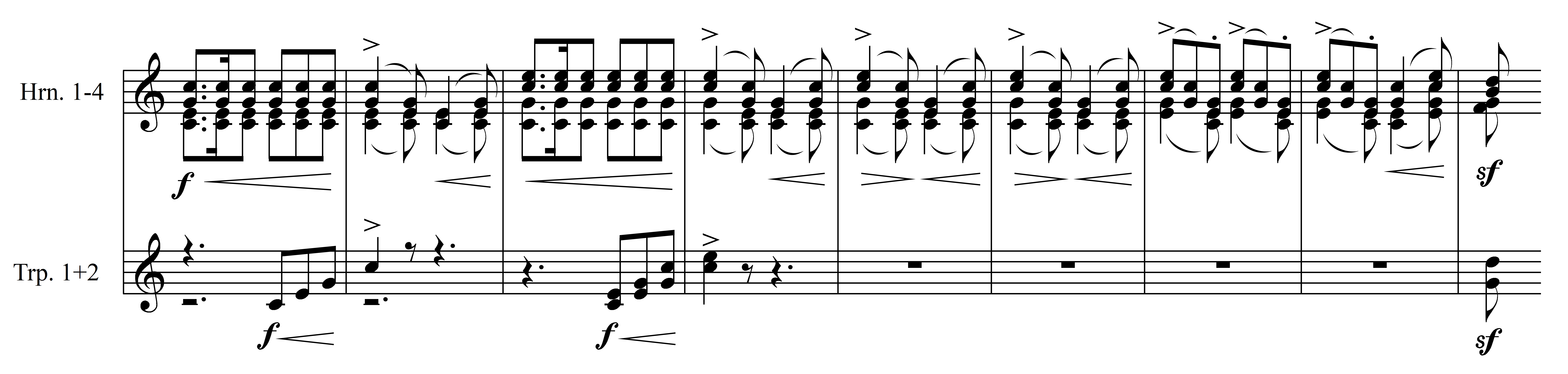 Notenbeispiel Smetana Die Moldau Waldjagd T. 80-88